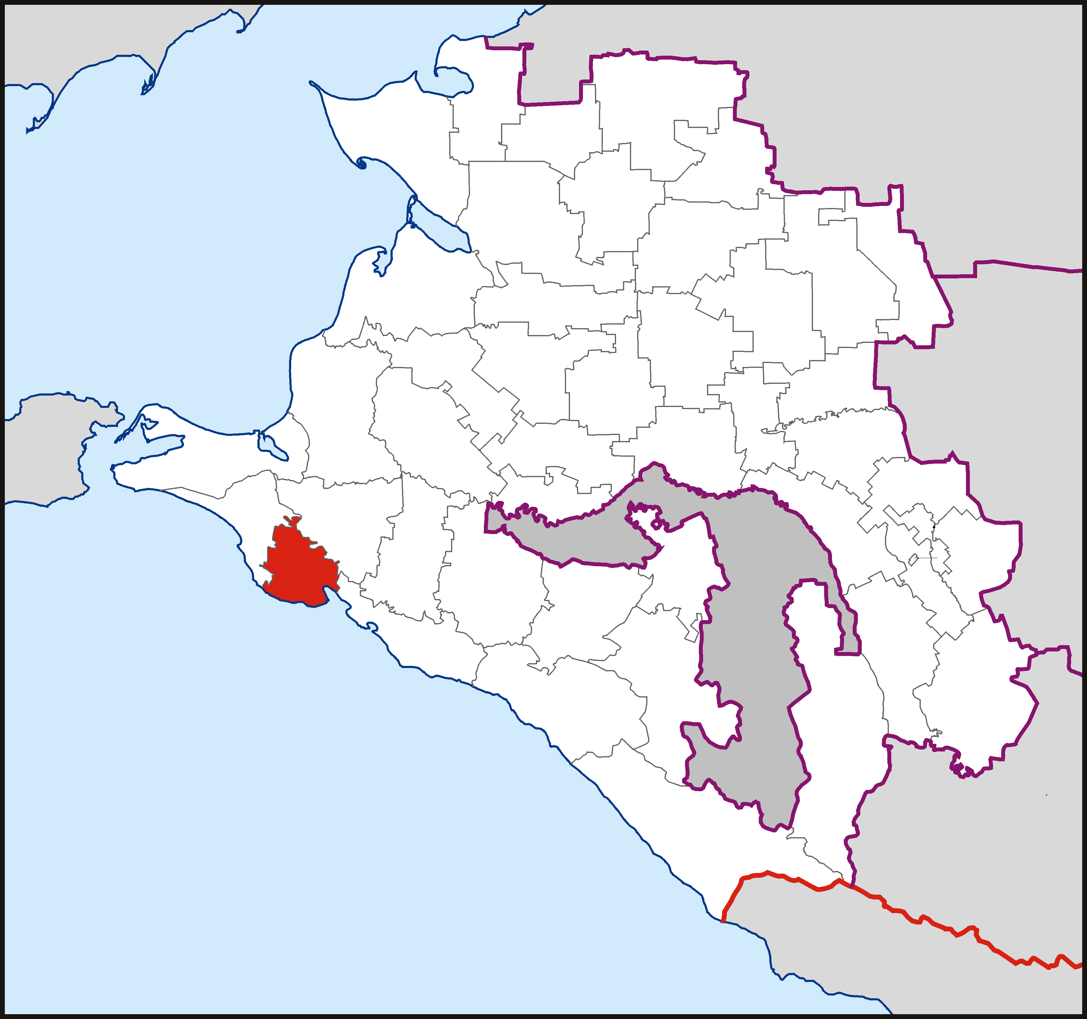 Муниципальное образование "Город-герой Новороссийск" на карте Краснодарского края